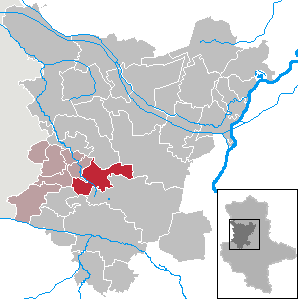 Eilsleben_in_Saxony-Anhalt_(Country)_-_District_(Landkreis)_Börde